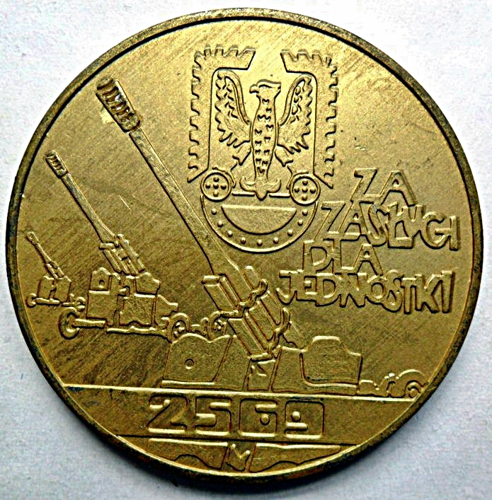 Medal pamiątkowy 79 Pułku Rakietowego Obrony Powietrznej